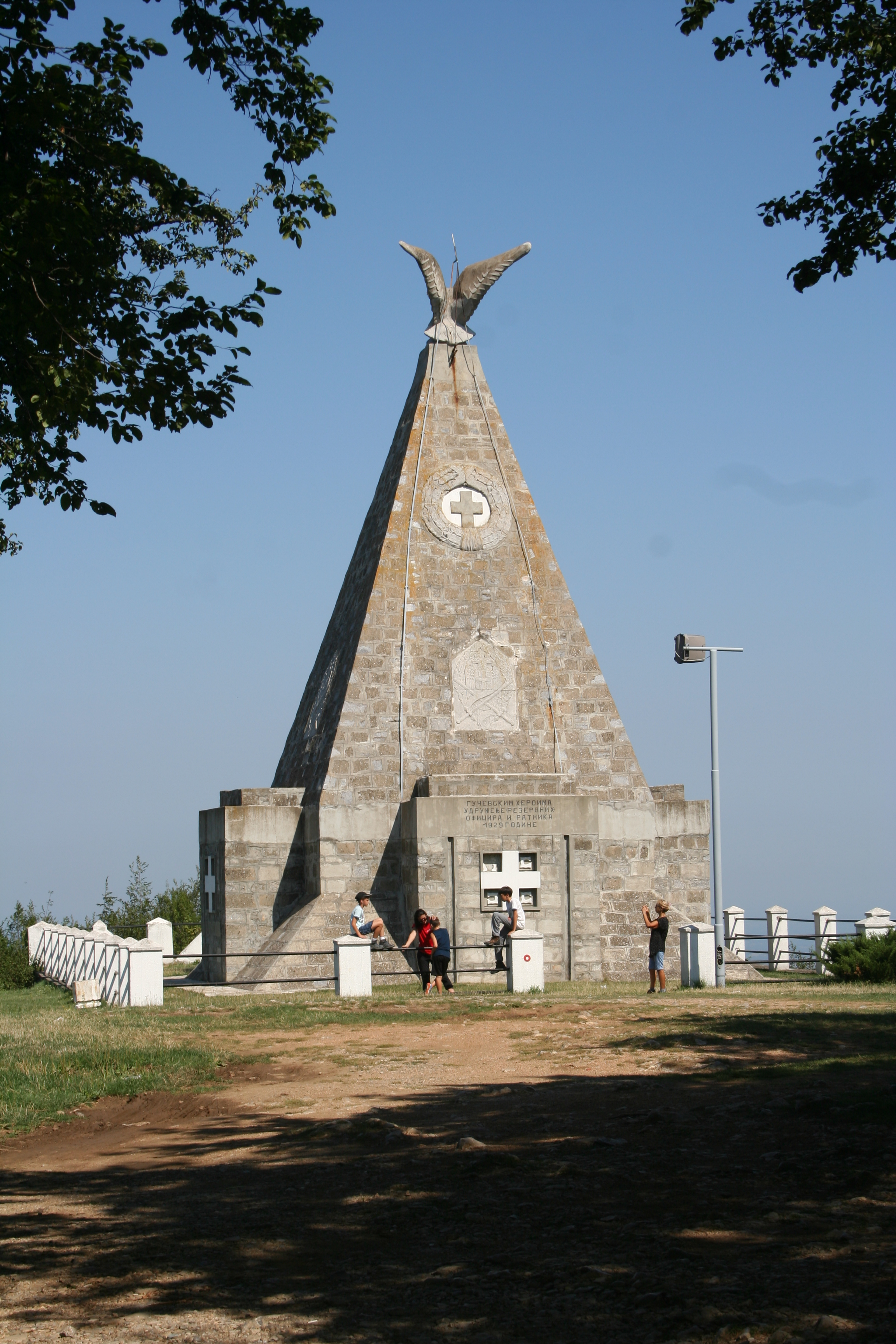 Spomen kosturnica na Gučevu